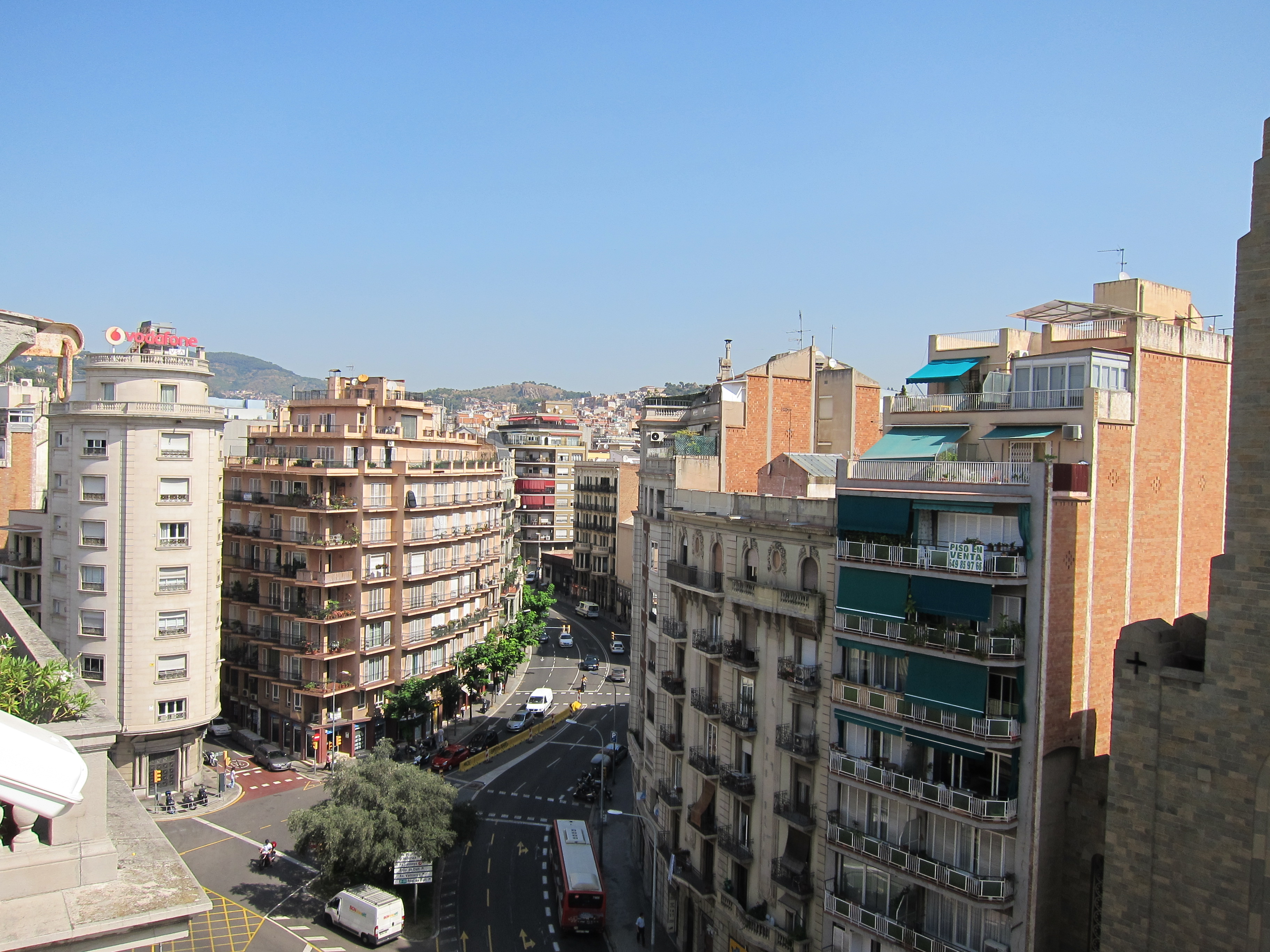 Vista a partir do Hotel Via Augusta